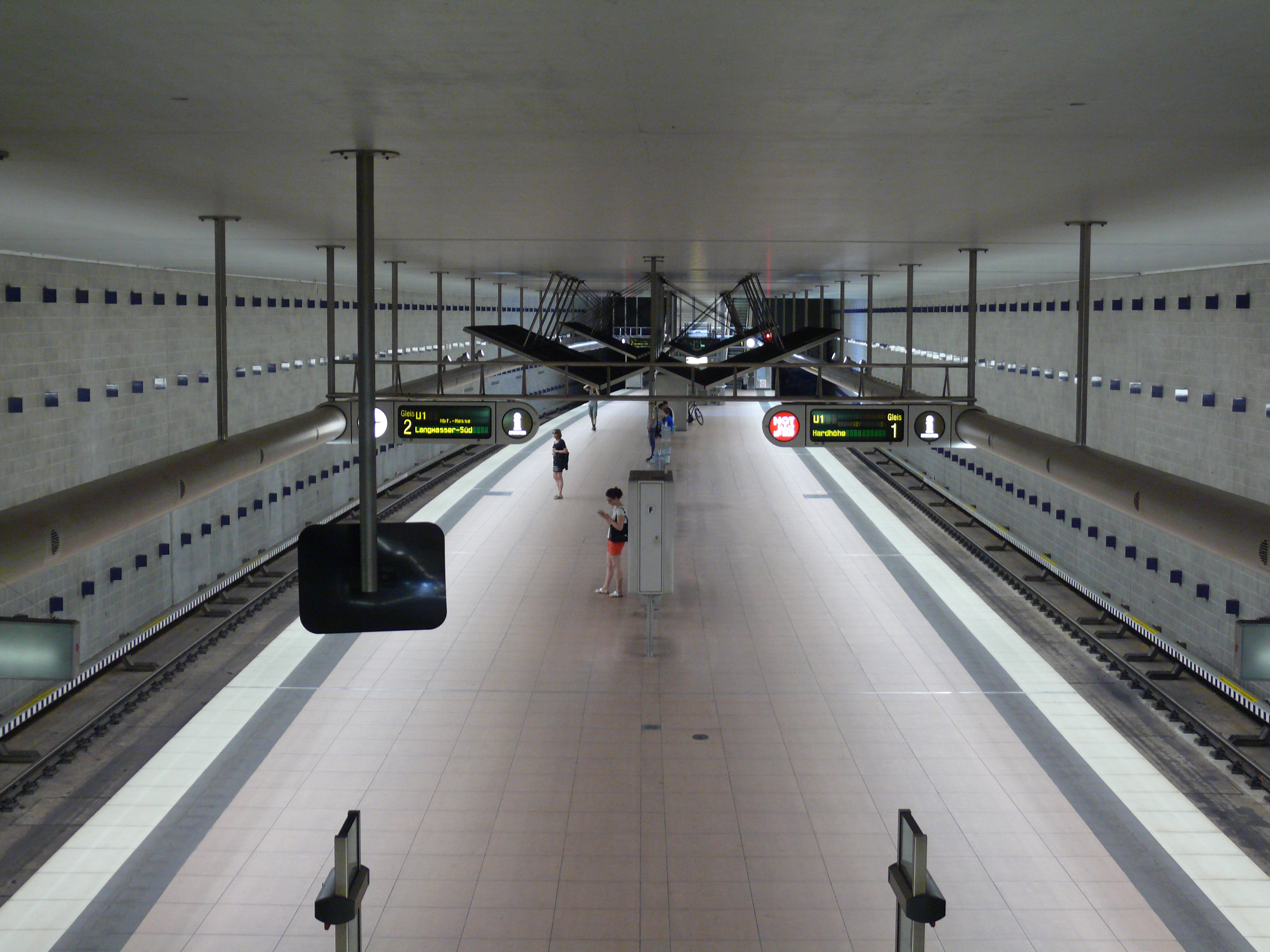 Blick auf die Bahnsteigebene am U-Bahnhof Stadthalle in Fürth. Hier die Ansicht mit den blauen Keilen an den Bahnsteigwänden.